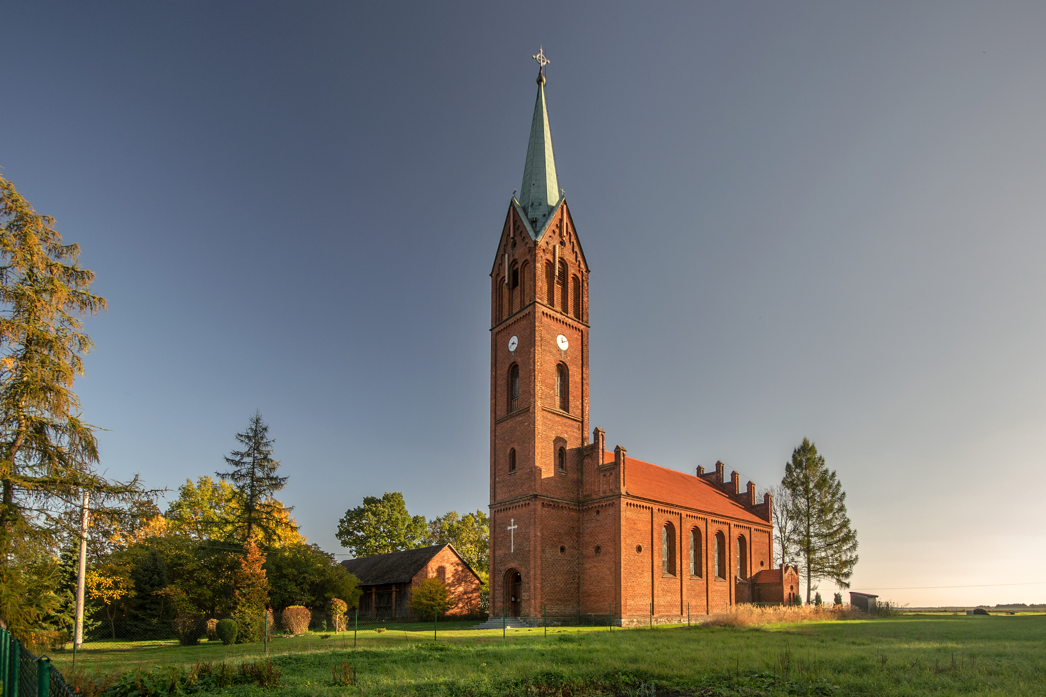 Kościół ewangelicki w Lasowicach Wielkich, gm. Lasowice Wielkie, pow. kluczborski, woj. opolskie